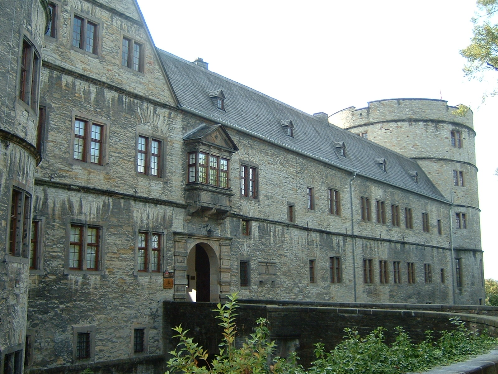 Ostflügel der Wewelsburg bei Büren, links ist noch ein Teil des Südostturmes zu sehen, rechts auf der Nordecke der Burg befindliche Hauptturm